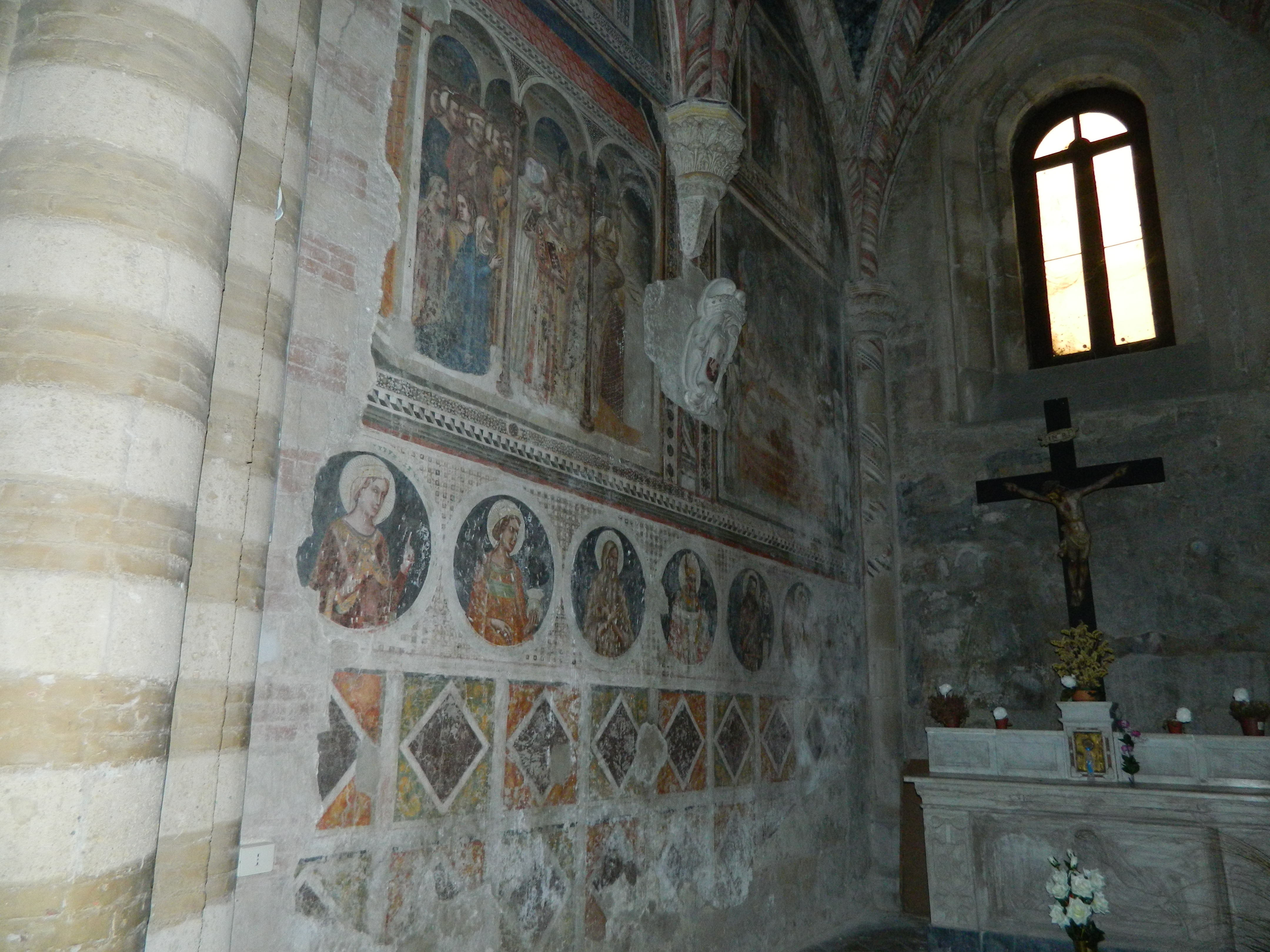 Affreschi della cappella Leonessa della Chiesa di San Pietro a Majella (Napoli)